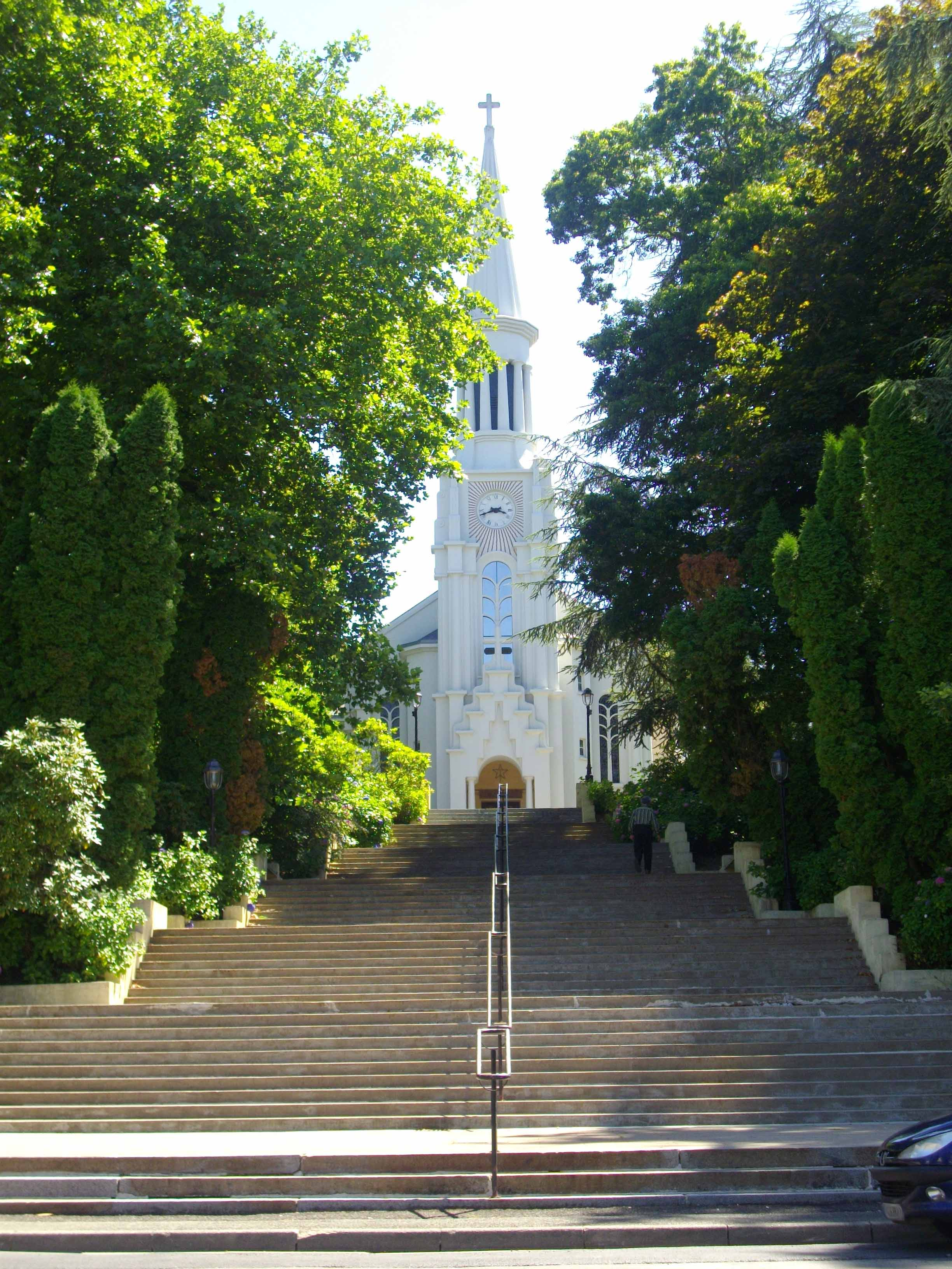 Église Saint-Jean-Baptiste, Bagnoles-de-l'Orne (Basse-Normandie, France)